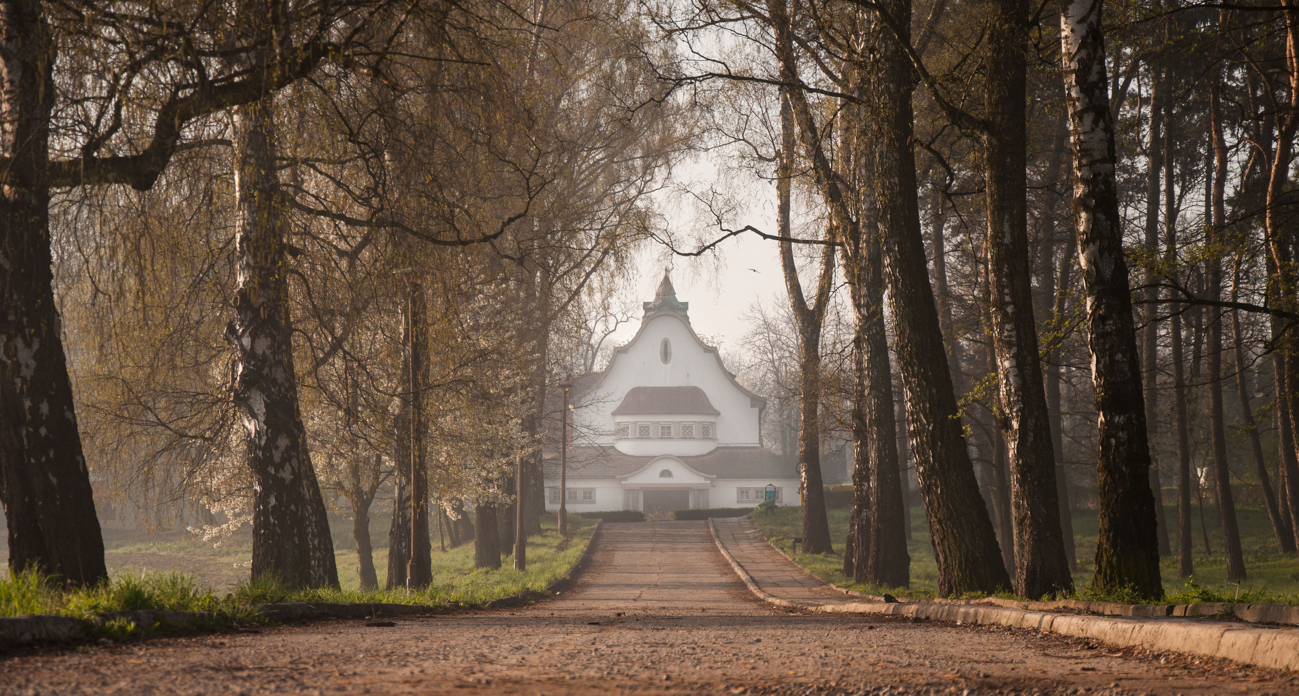 Kraków, dom kultury, pocz. XX